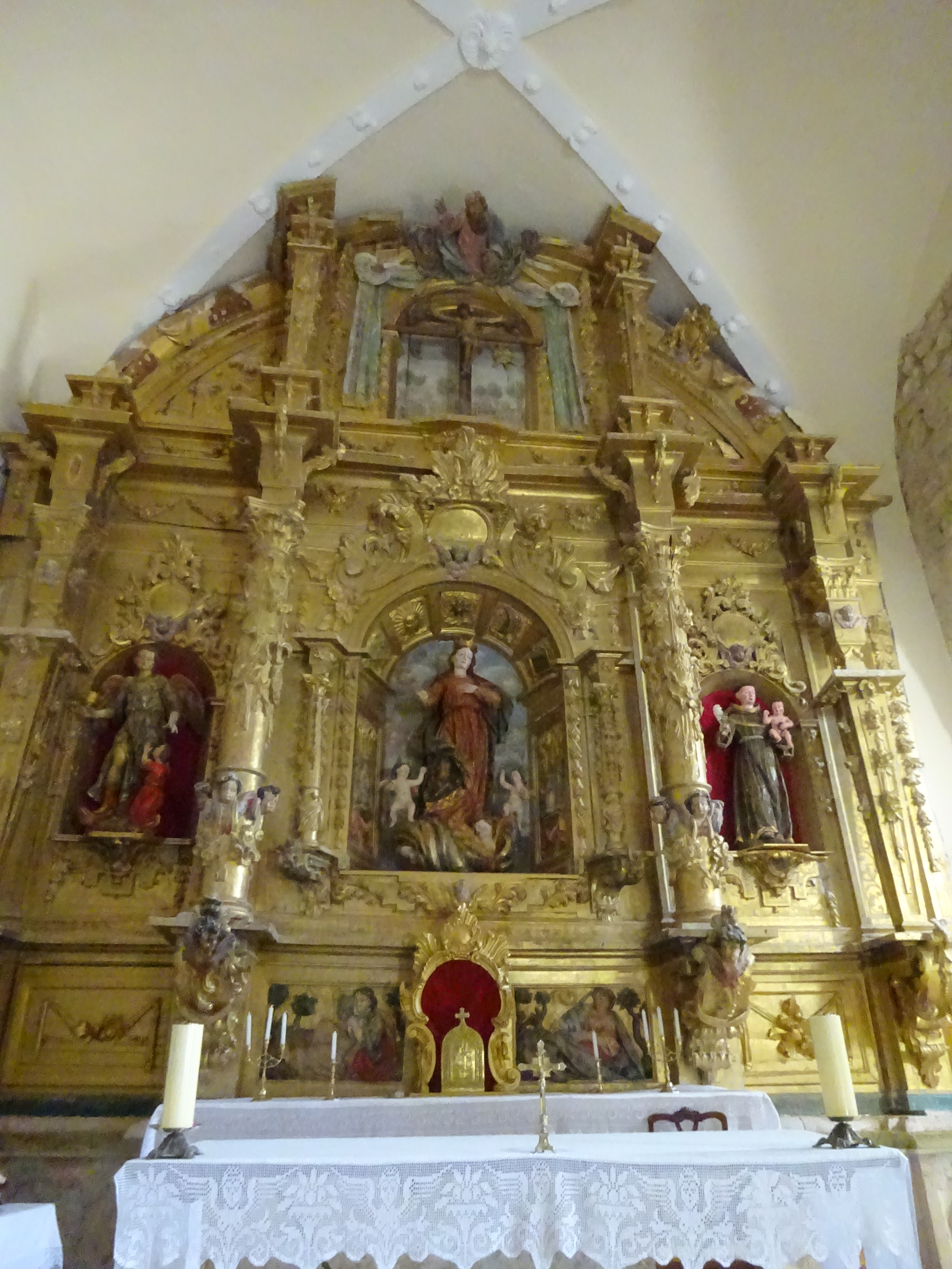 Retablo Mayor